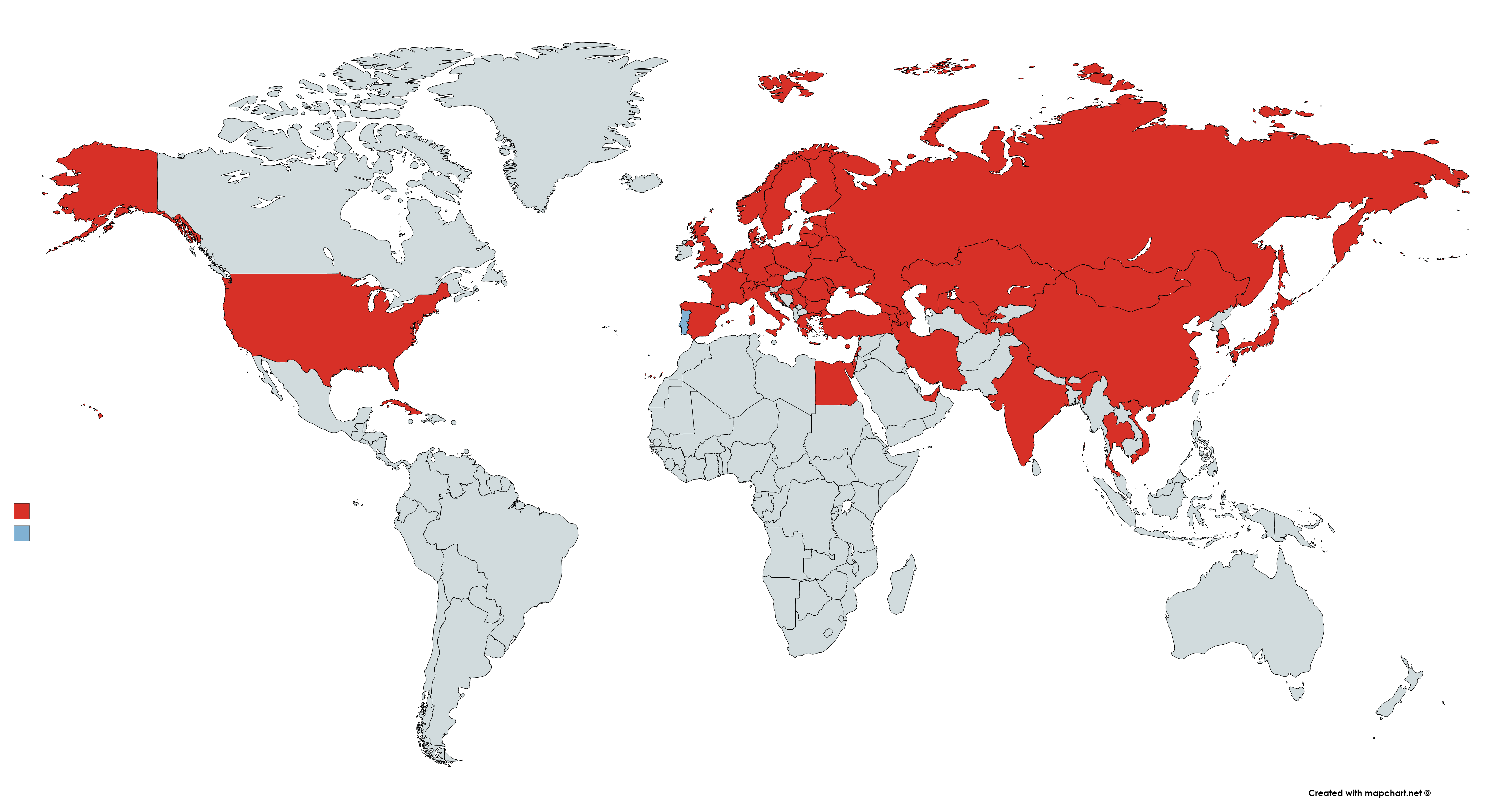 siht